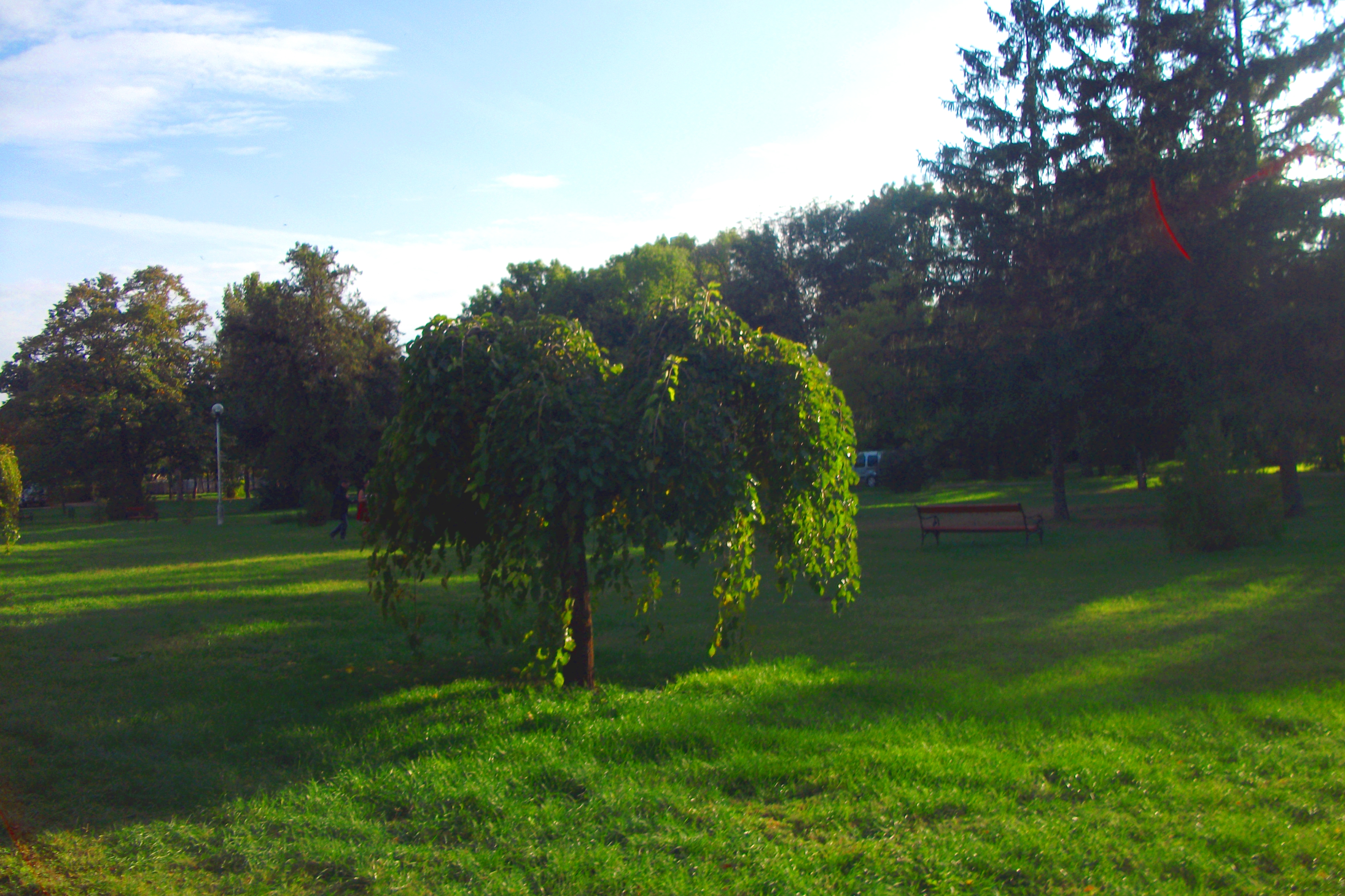 A Zichy-kastély kertjének egyik fája. (Zichyújfalu)